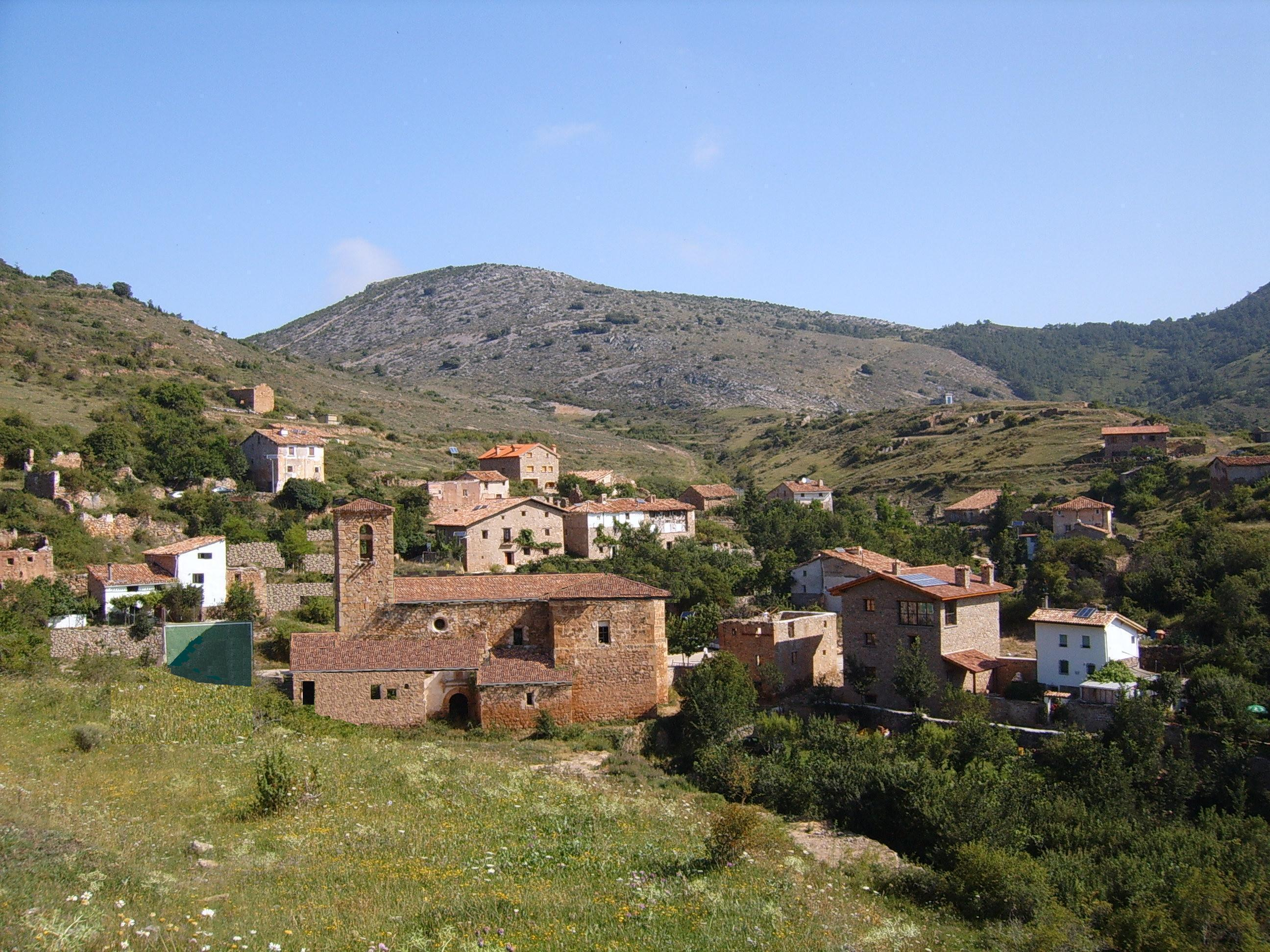 Vista de Luezas de Cameros